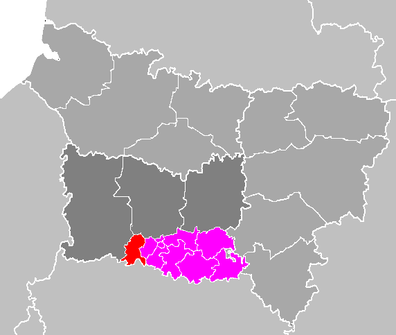 Maps of arrondissements and cantons of France: Département de l'Oise